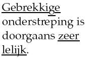 Beschrijving: Voorbeeld van gebruik van gebrekkige onderstreping, die wisselt per letter of door staarten heengaat. Lettertype: Palatino (Eigenlijk: URW Palladio), eigen werk.